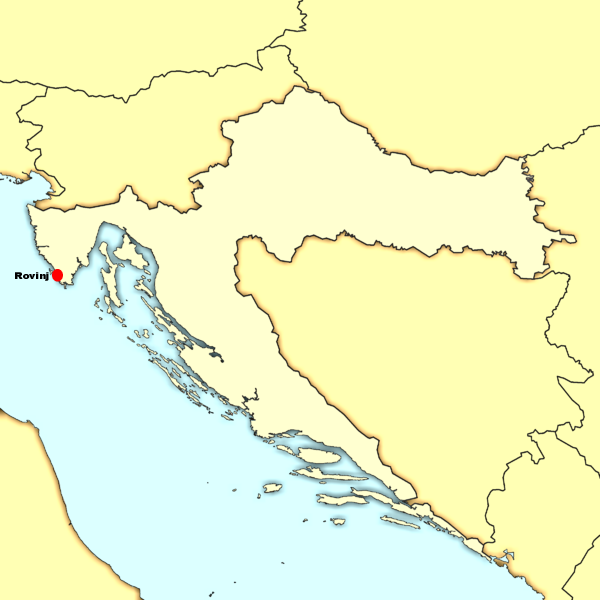 Lag vu Rovinj op der Kaart.